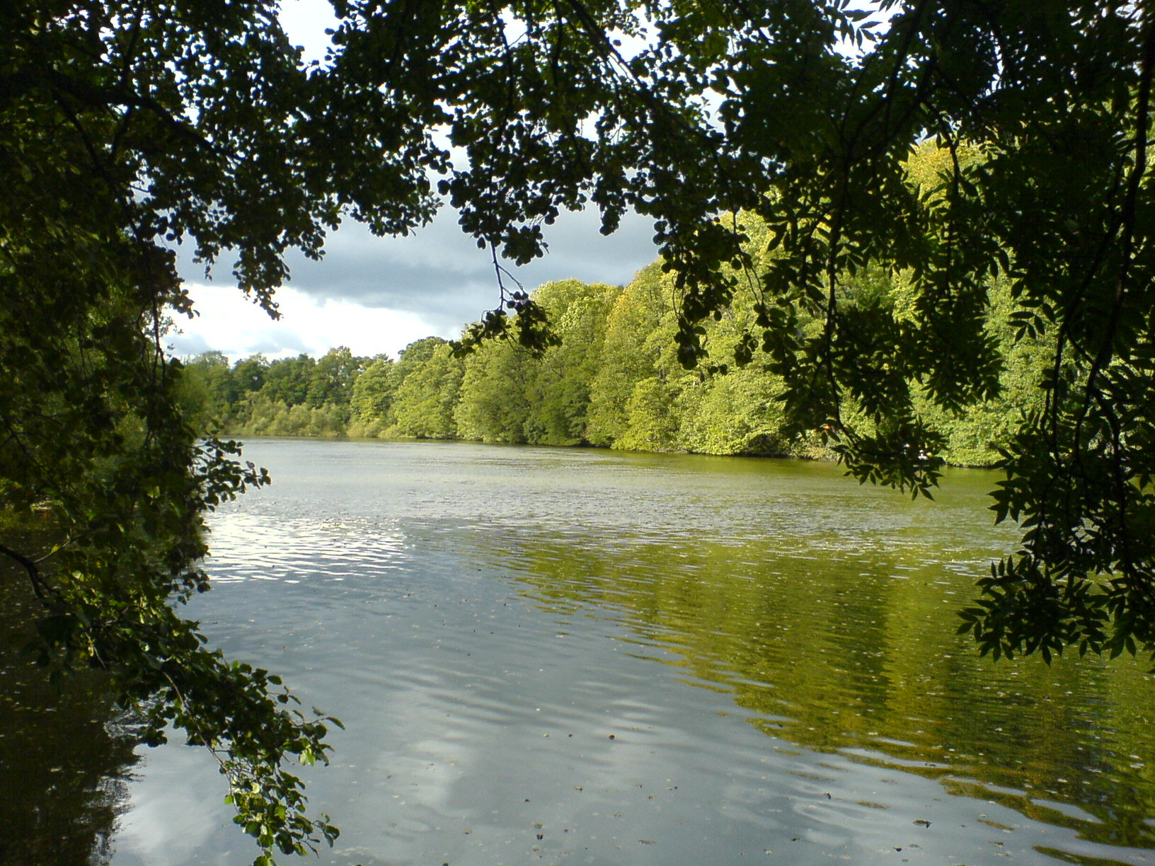 Åbackarna i Norrköping september 2007. Utsikt från Rhododendrondalen.